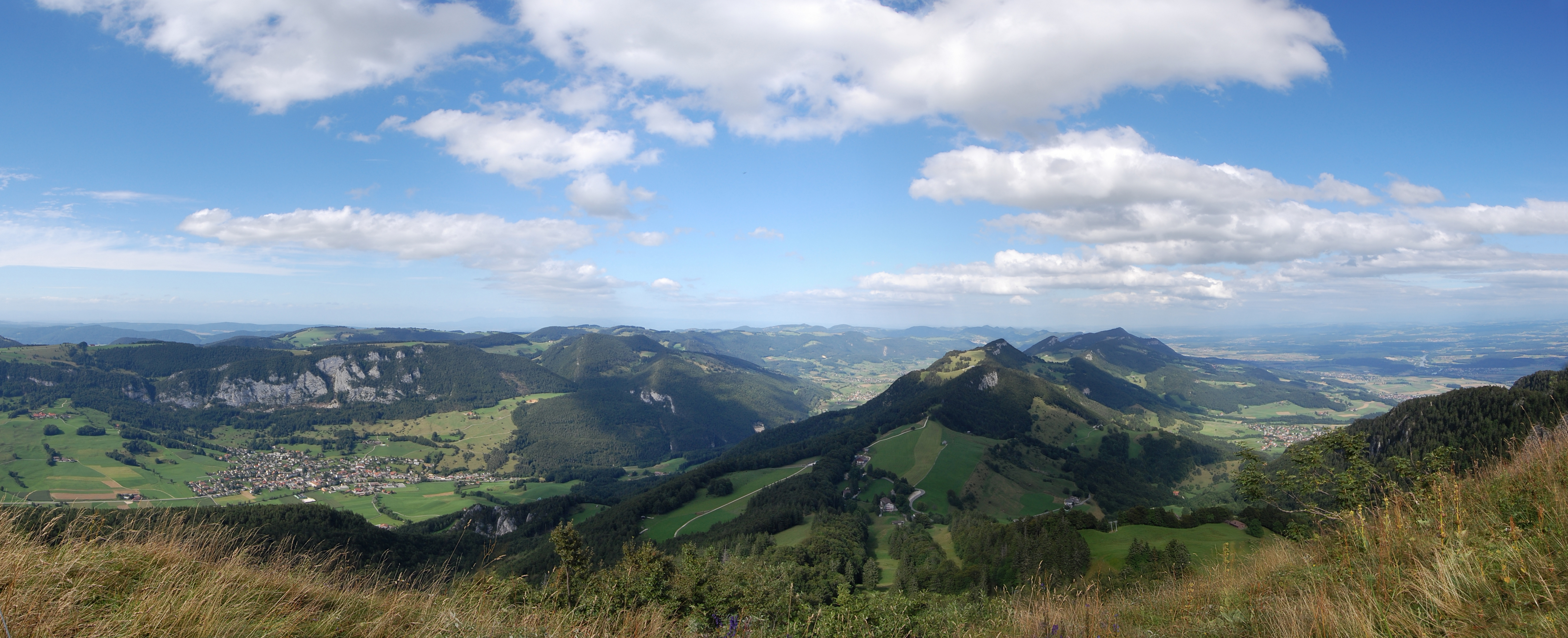 Panorama, aufgenommen von der Röti im Weissensteinzug. Links im Bild ist Welschenrohr zu erkennen, in der Mitte der Balmberg